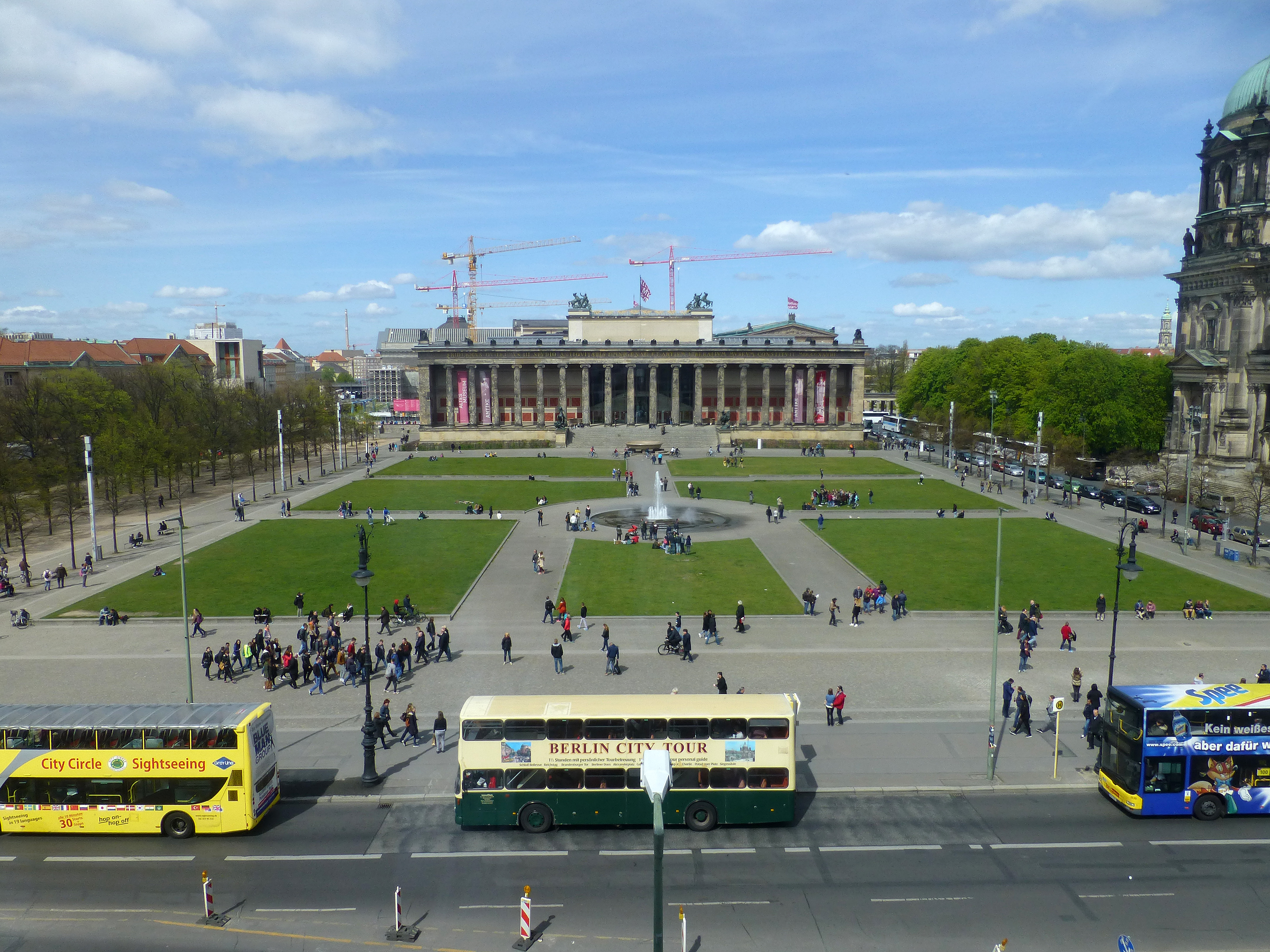 Berlin (Allemagne) : vue depuis la Humboldt-Box.